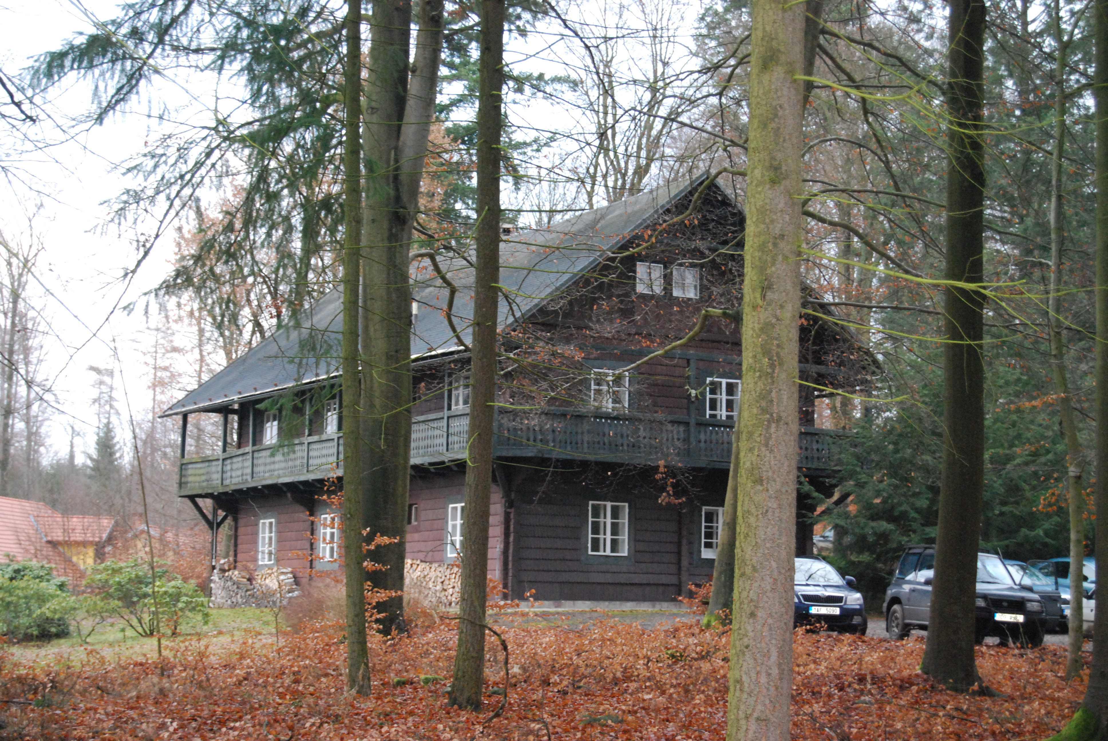 Tyrolský dům z roku 1814 je lovecký schwarzenberský zámeček v areálu Rukávečské obory, zvané též Květovská obora. Rukáveč - část města Milevsko v okrese Písek. Česká republika.